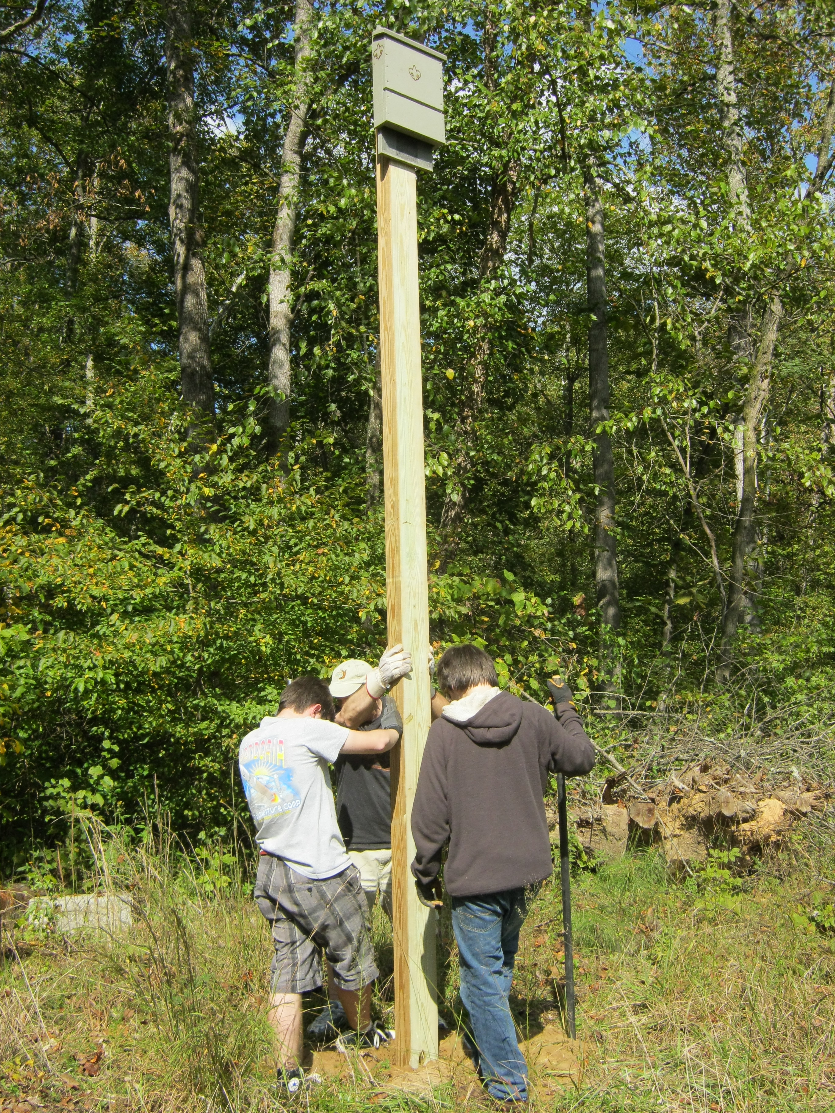 Jack Berberette installing bat boxes dhb